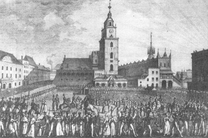 M. Stachowicz - " Zajęcie Odwachu głównego i zawieszenie Orła przez wojska Księstwa Warszawskiego 15 lipca 1809 " - 1822